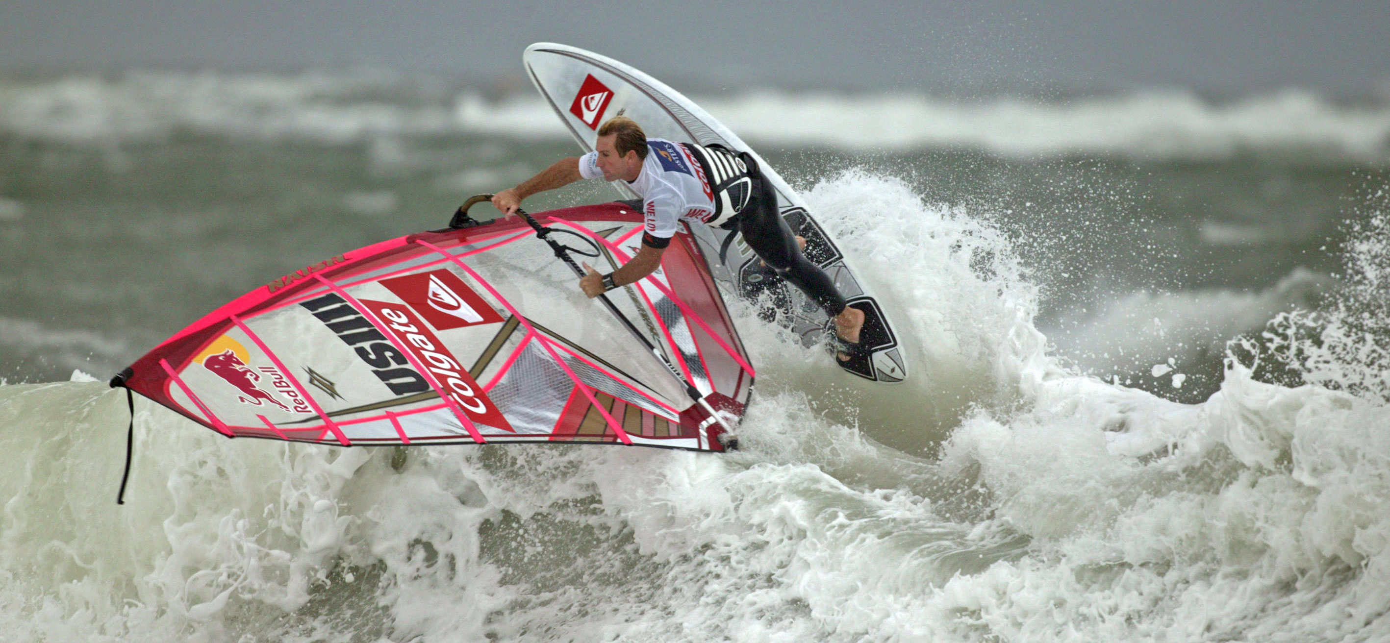 Robby Naish beim CWCS